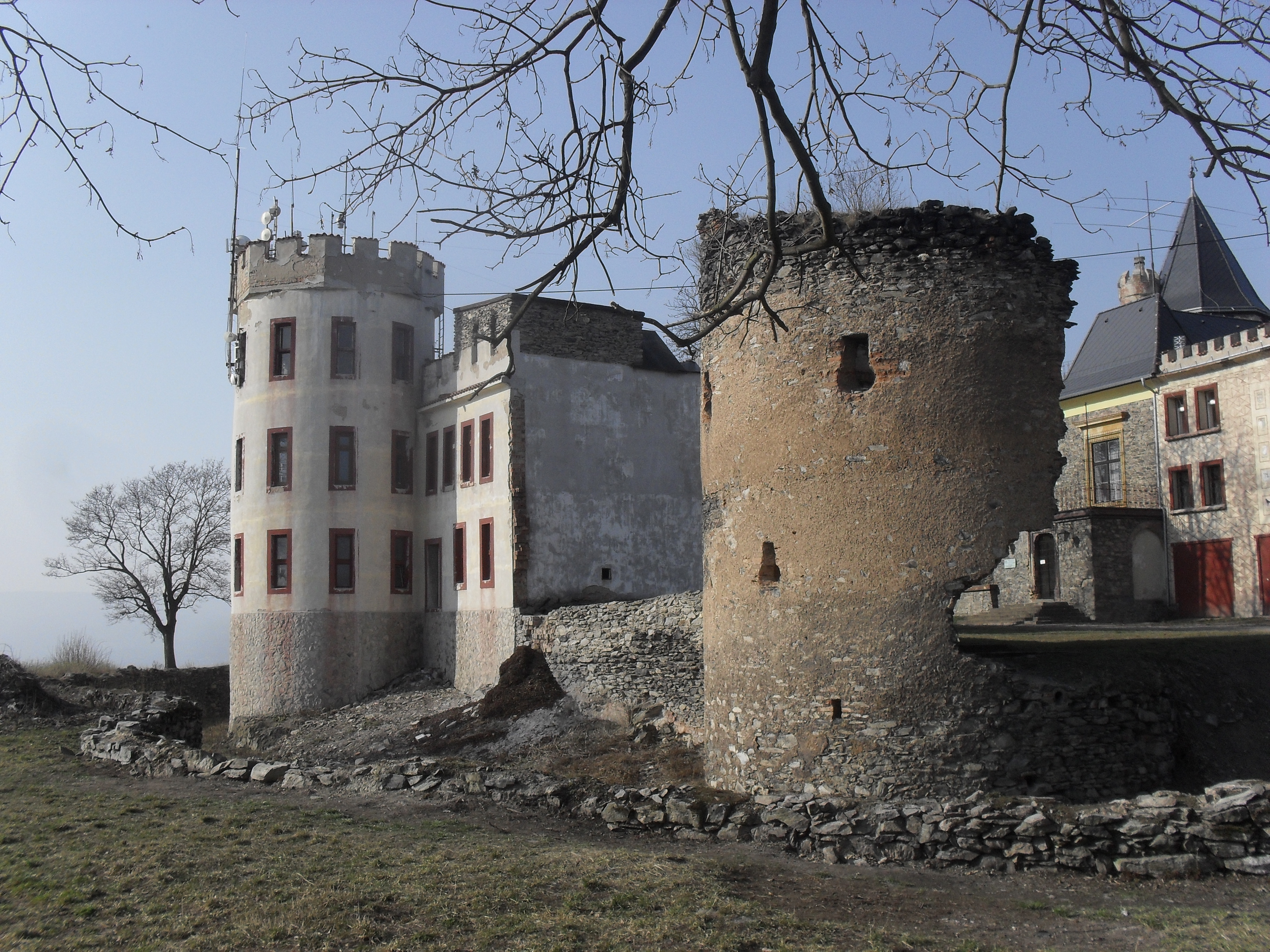 Hrad Doubravská hora, hradní zřícenina, a dominanta města Teplice.